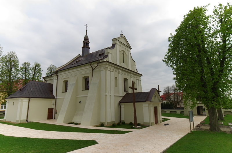 Sawin - rzymskokatolicki kościół parafialny p.w. Przemienienia Pańskiego, 1731-1740